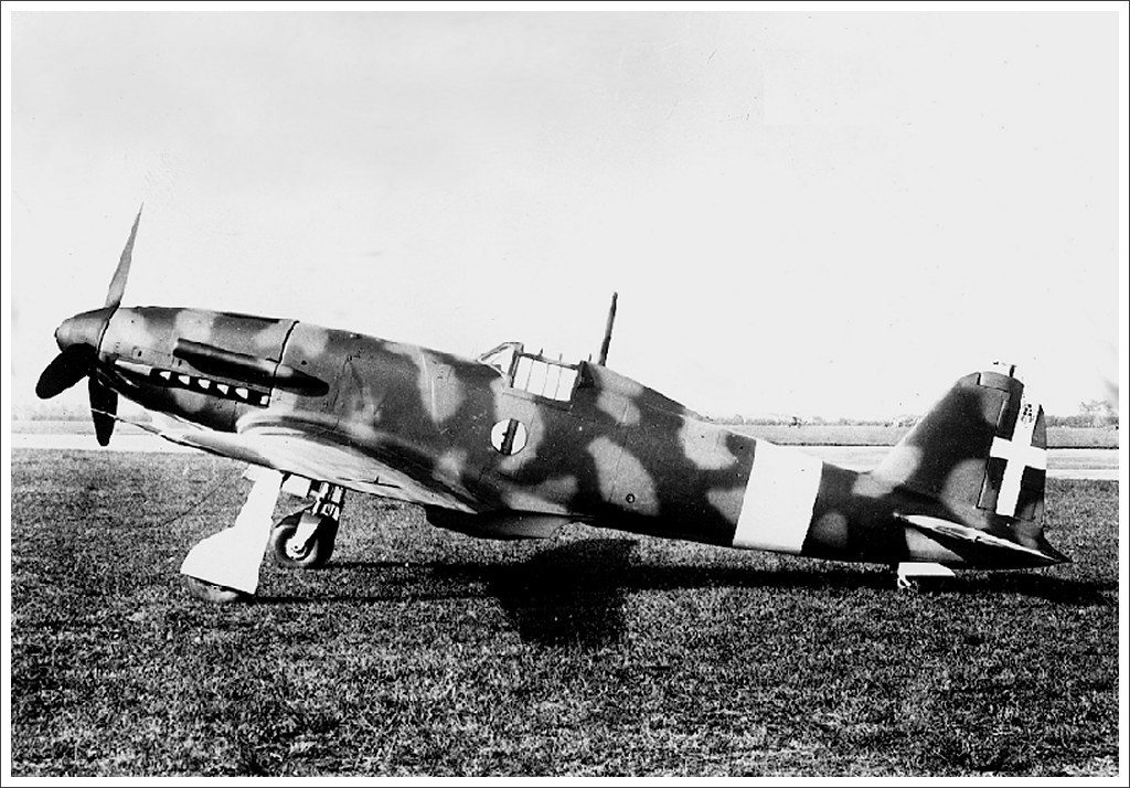 Uno dei migliori caccia italiani della seconda guerra mondiale, il Fiat G.55 Categoria:Immagini di aeroplani